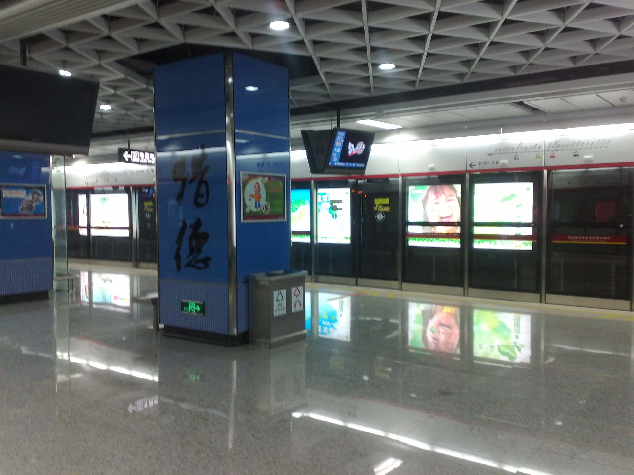 廣州地鐵獵德站站台